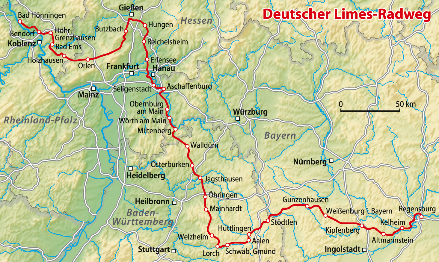 Verlauf des Deutschen Limes-Radwegs